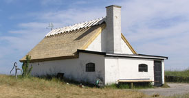 Ishus i Liseleje